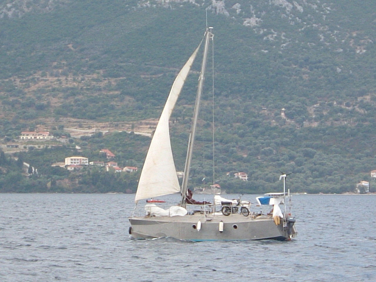 The Grey Bear navigazione Grecia Jonica 2003